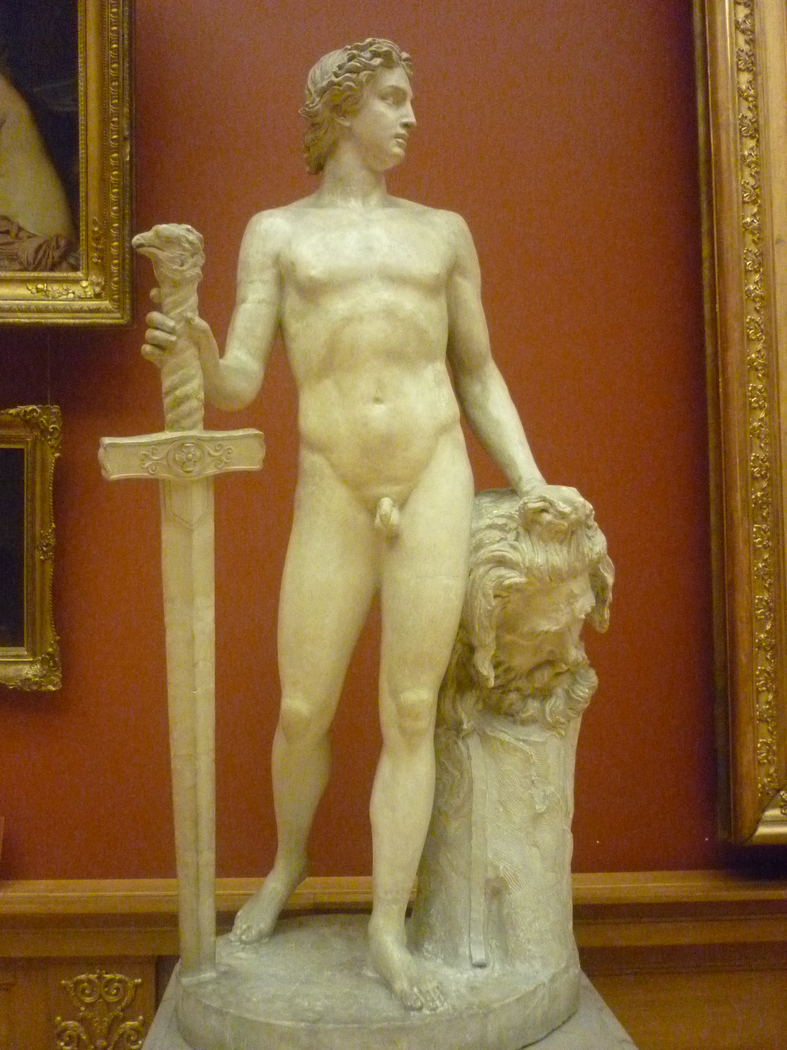 скульптура "Давид-юноша, победитель Голиафа" скульптора Александра Николаевича Беляева. 1849. Русский музей